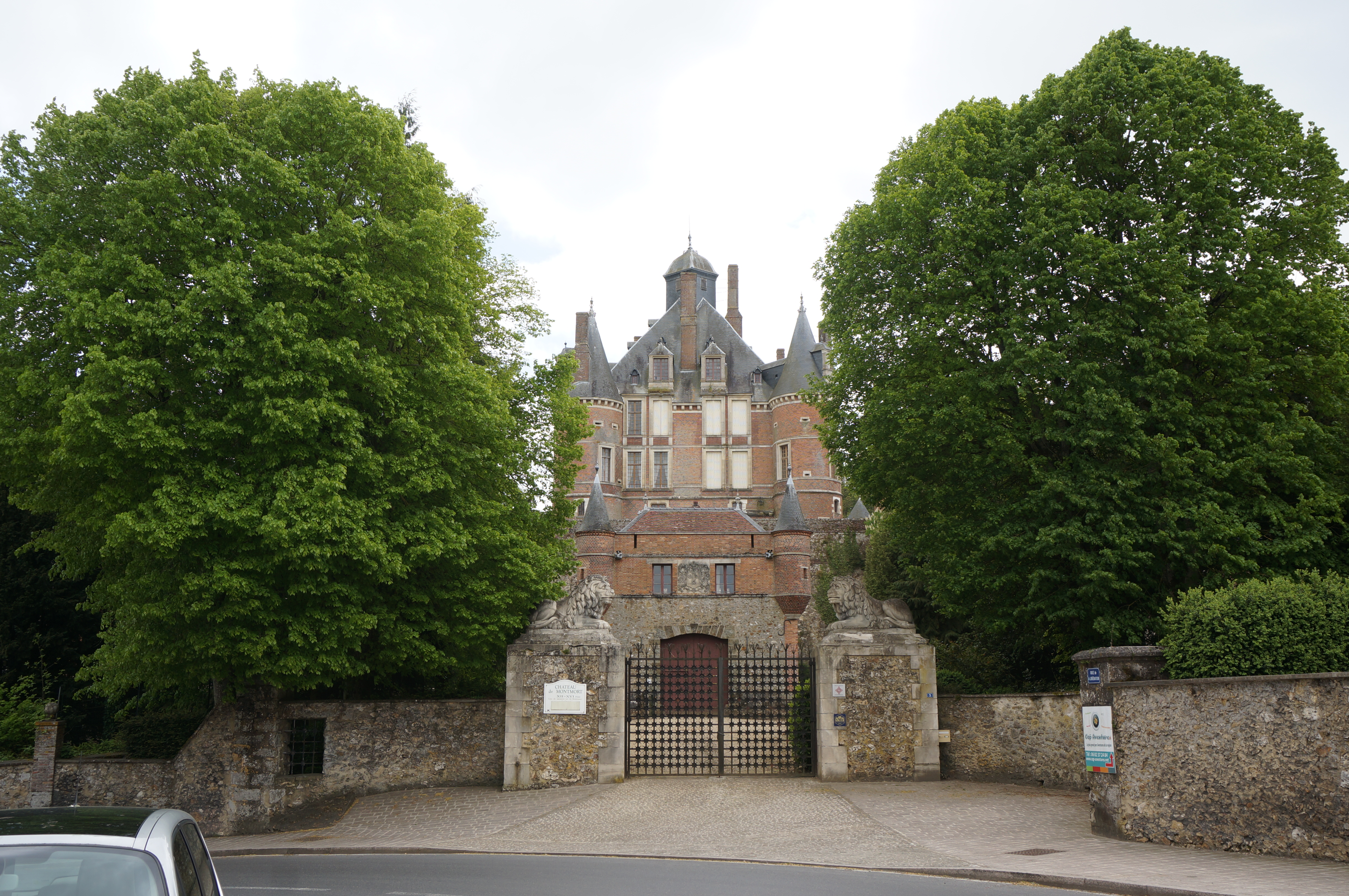 vue du Château de Montmort.